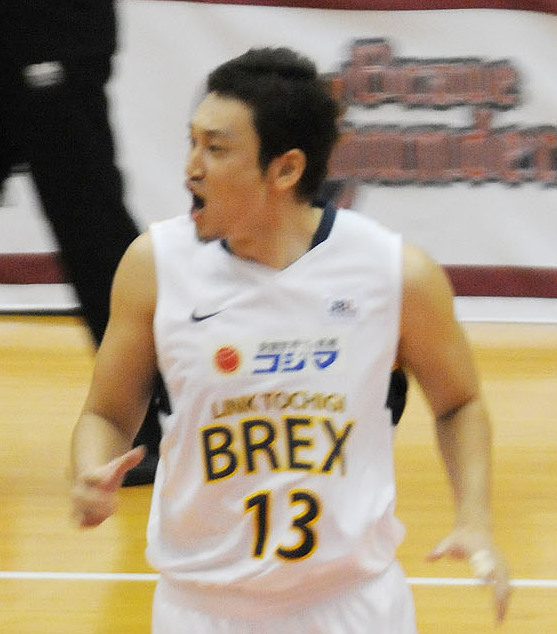 リンク栃木ブレックスの安齋竜三選手。とどろきアリーナで。